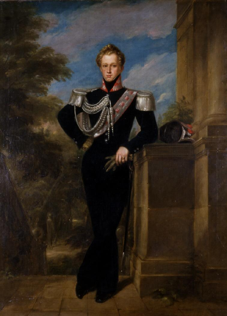 Retrato de Mariano Téllez Girón y Beaufort Spontin (1814-1882), XII duque de Osuna y Grande de España.